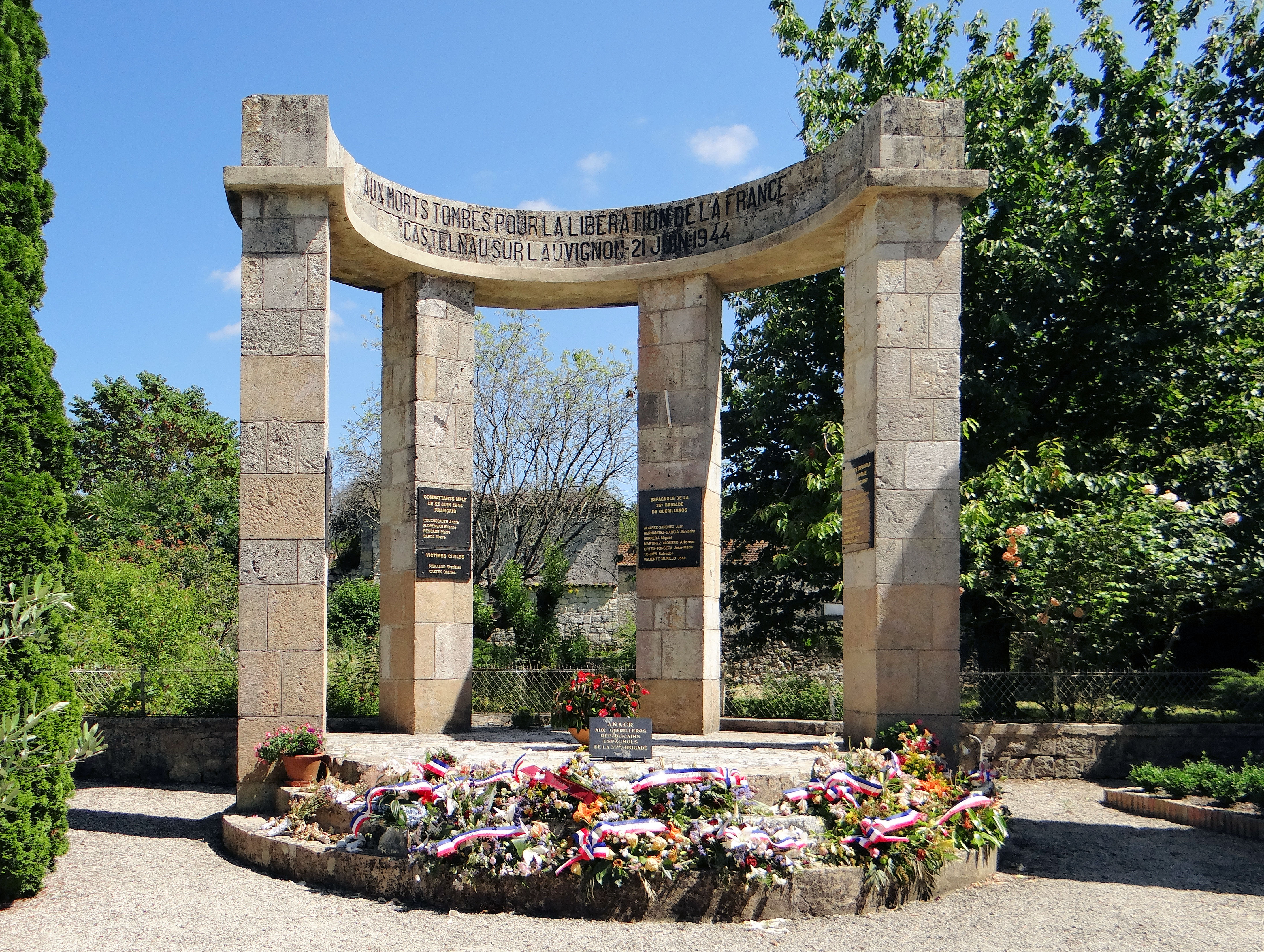 Castelnau-sur-l'Auvignon - Monument aux morts des combats du 21 juin 1944